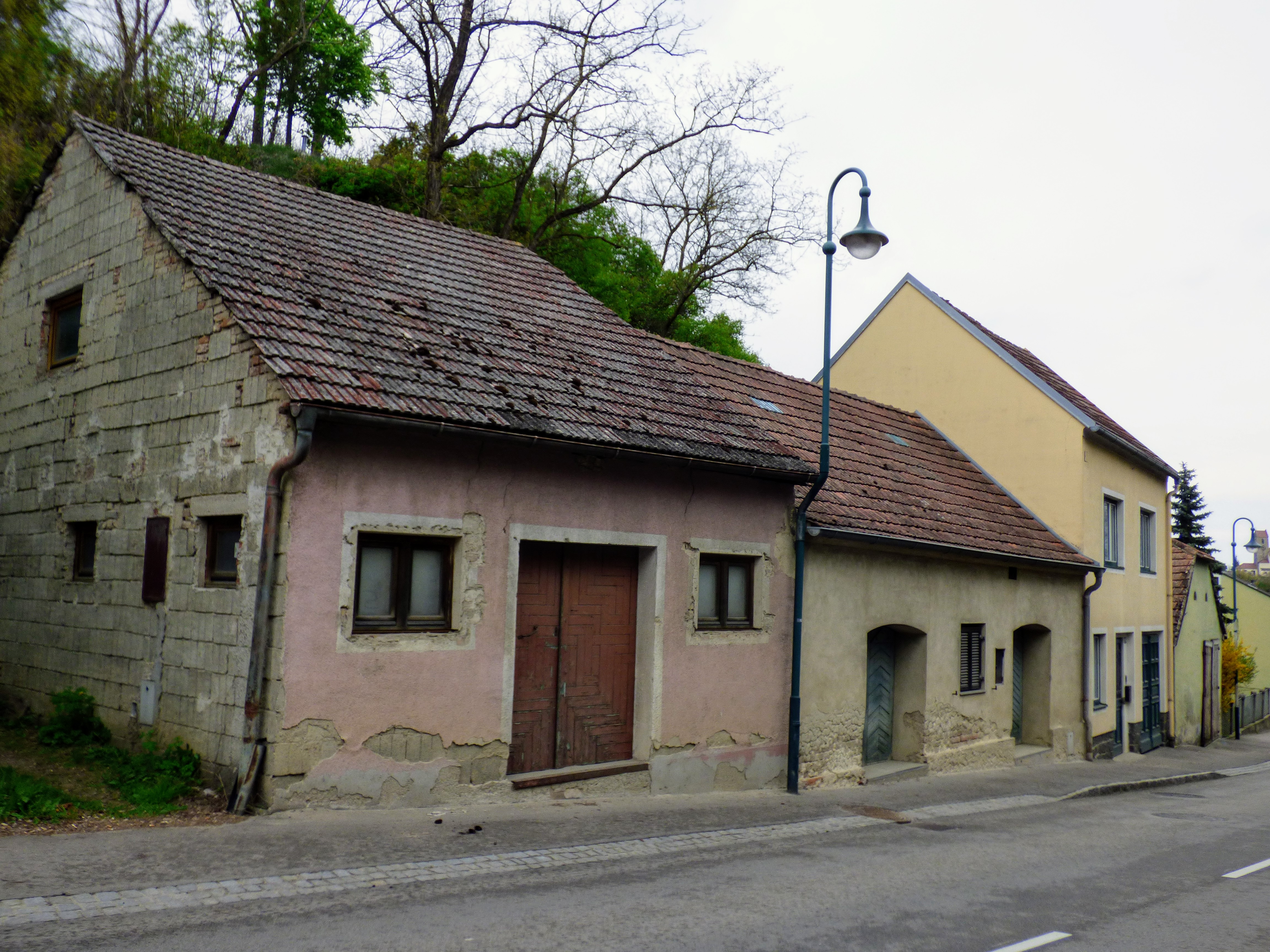 Keller in der Kremser Straße, Hohenwarth (Gemeinde Hohenwarth-Mühlbach)